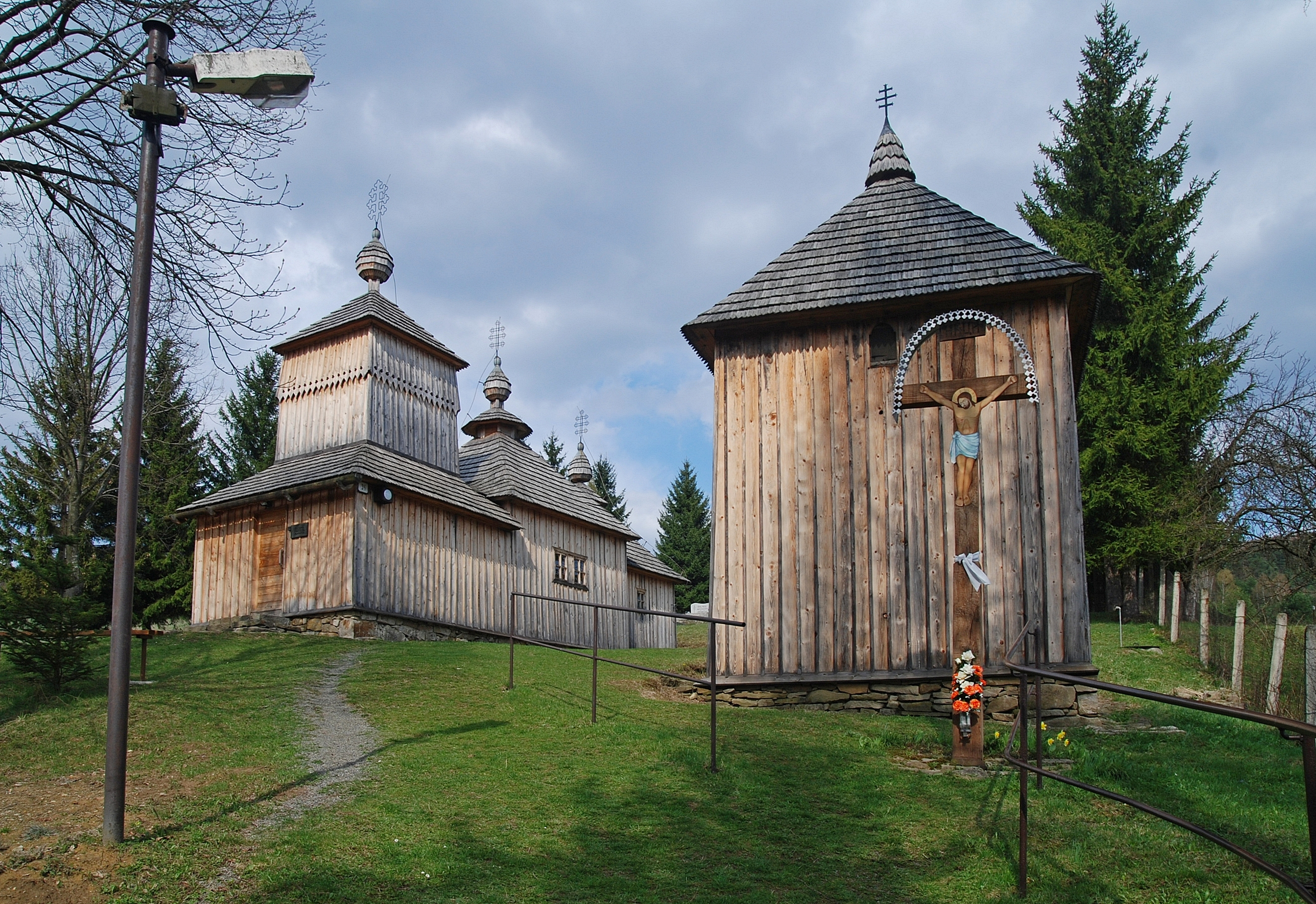 wieś Korejovce